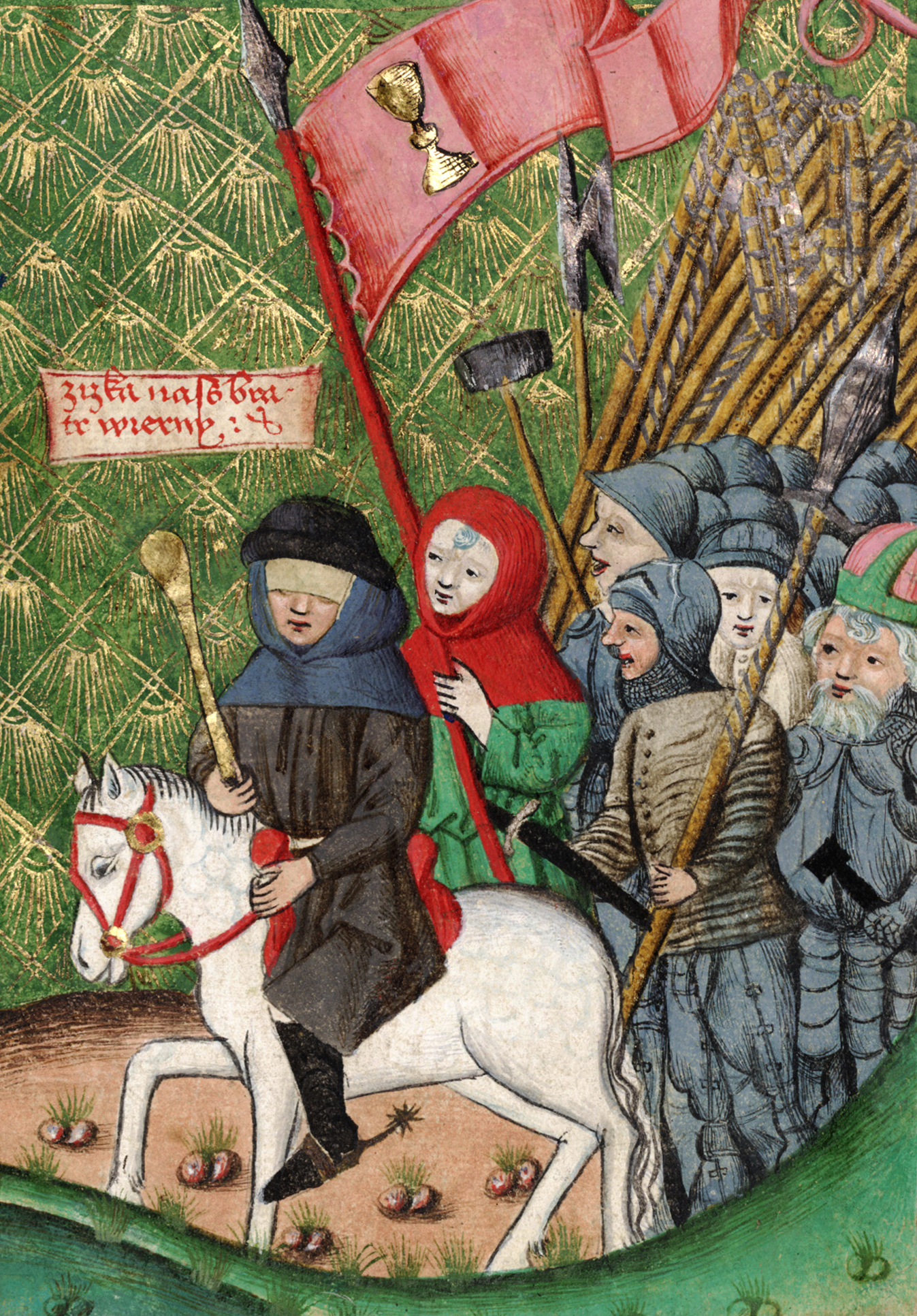 Jan Žizka vede polní vojsko, vyobrazení z Jenského kodexu z konce 15. století.